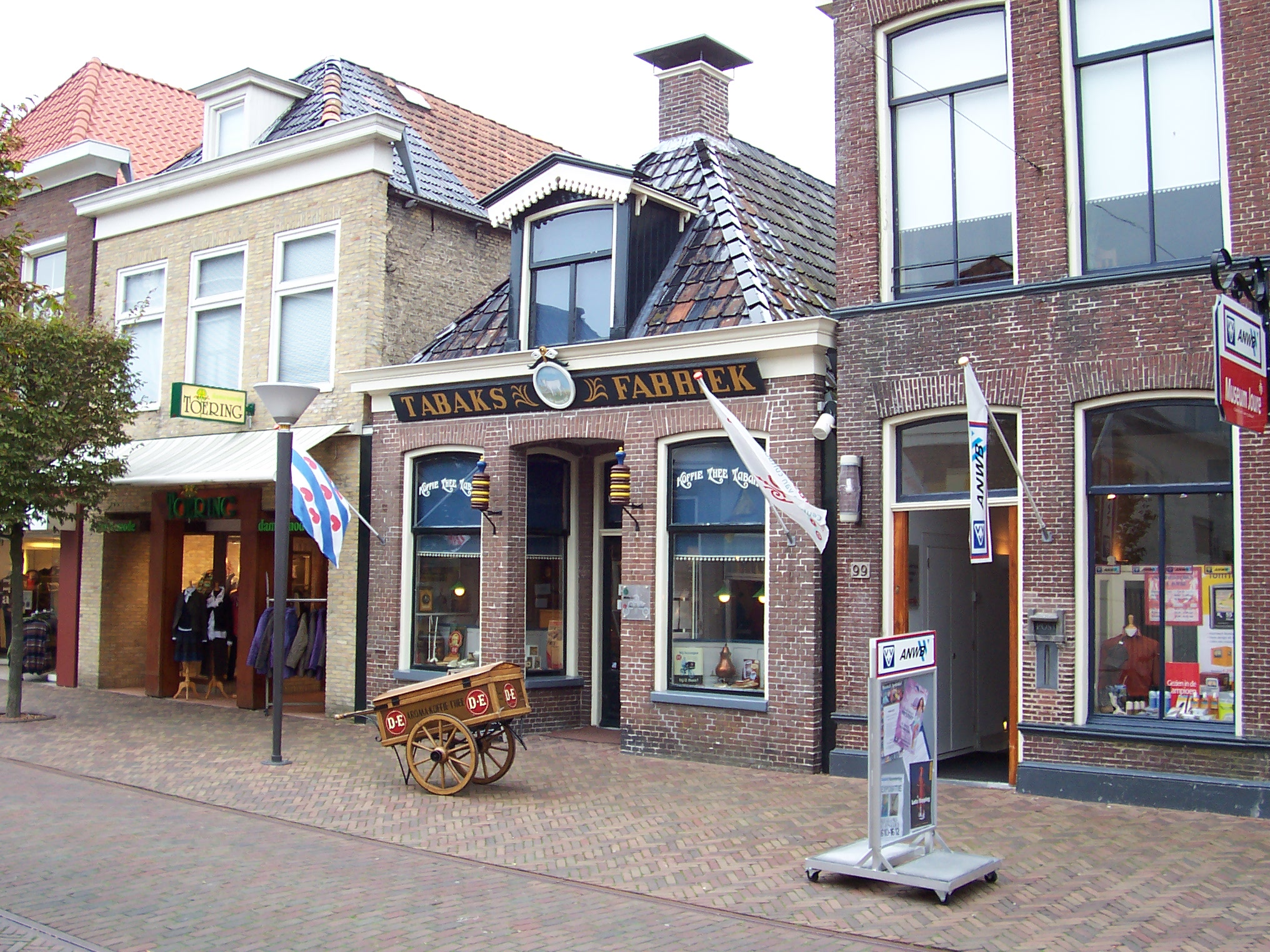 Museumwinkel "De Witte Os" in Joure. In deze winkel is de basis gelegd voor het bedrijf Douwe Egberts.